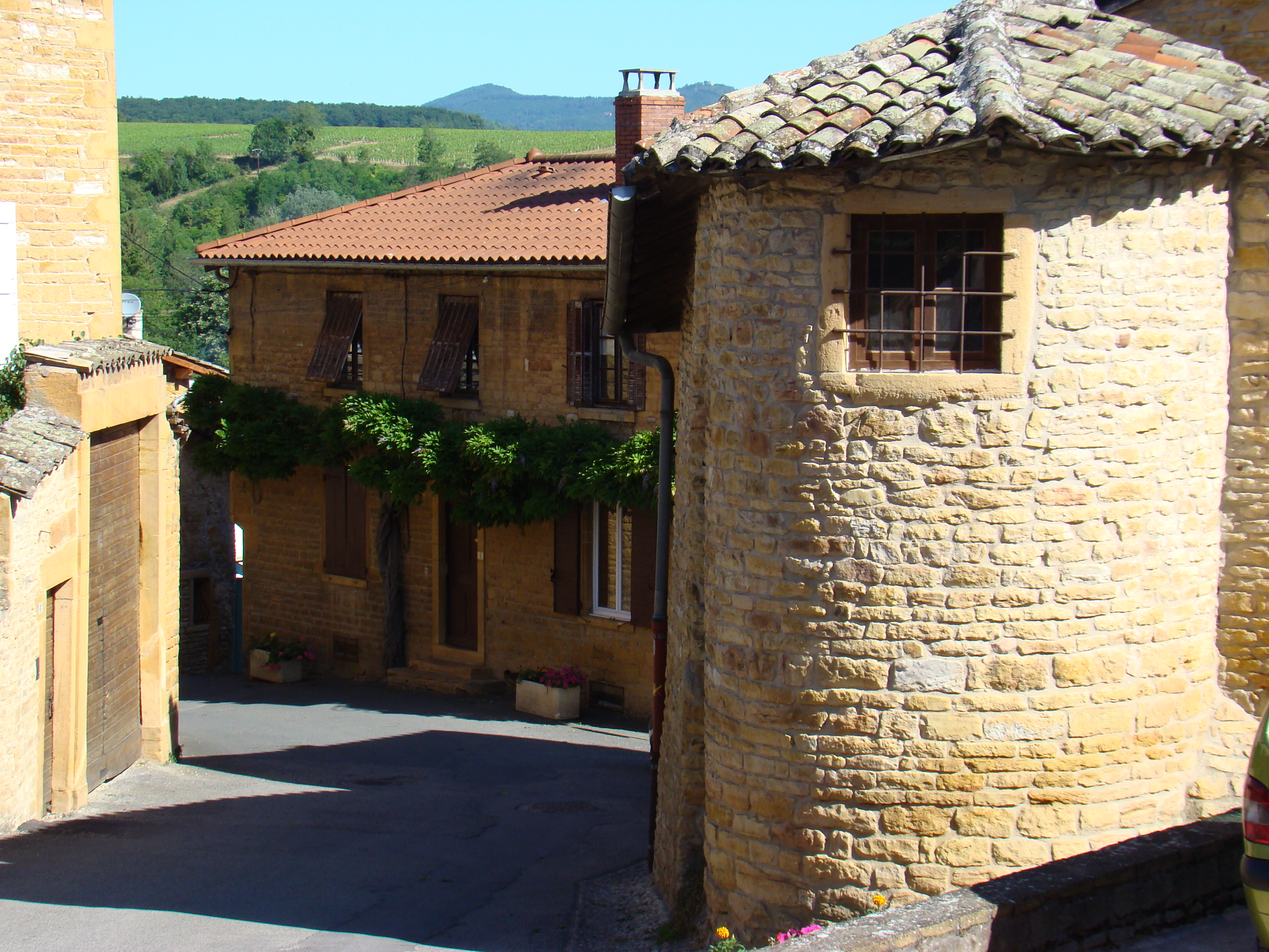 Pierres dorées à Pouilly-le-Monial